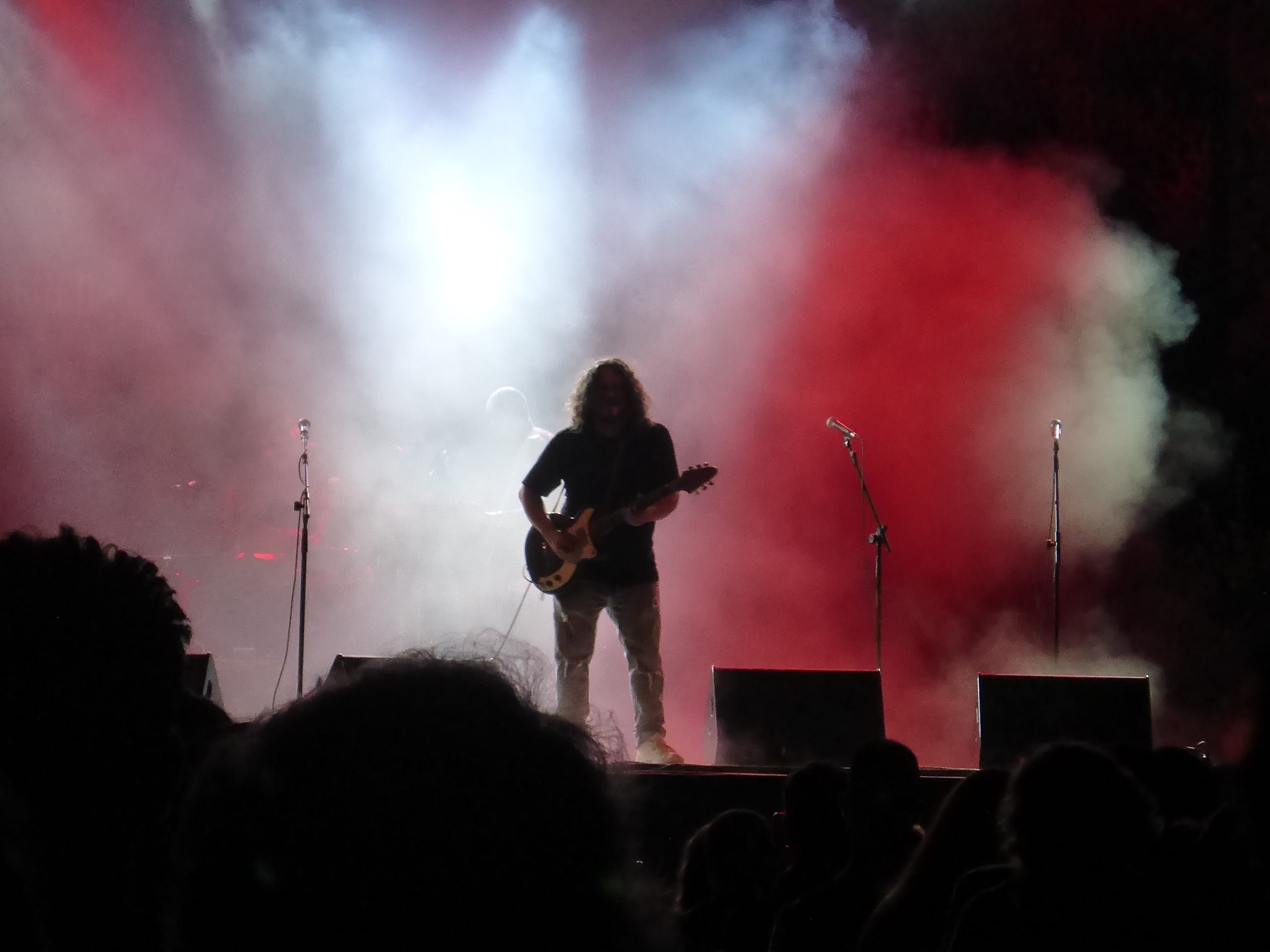 Concierto de Raimundo Amador en el ciclo Noches de Bohemia, Alcázar de Jerez de la Frontera (España)